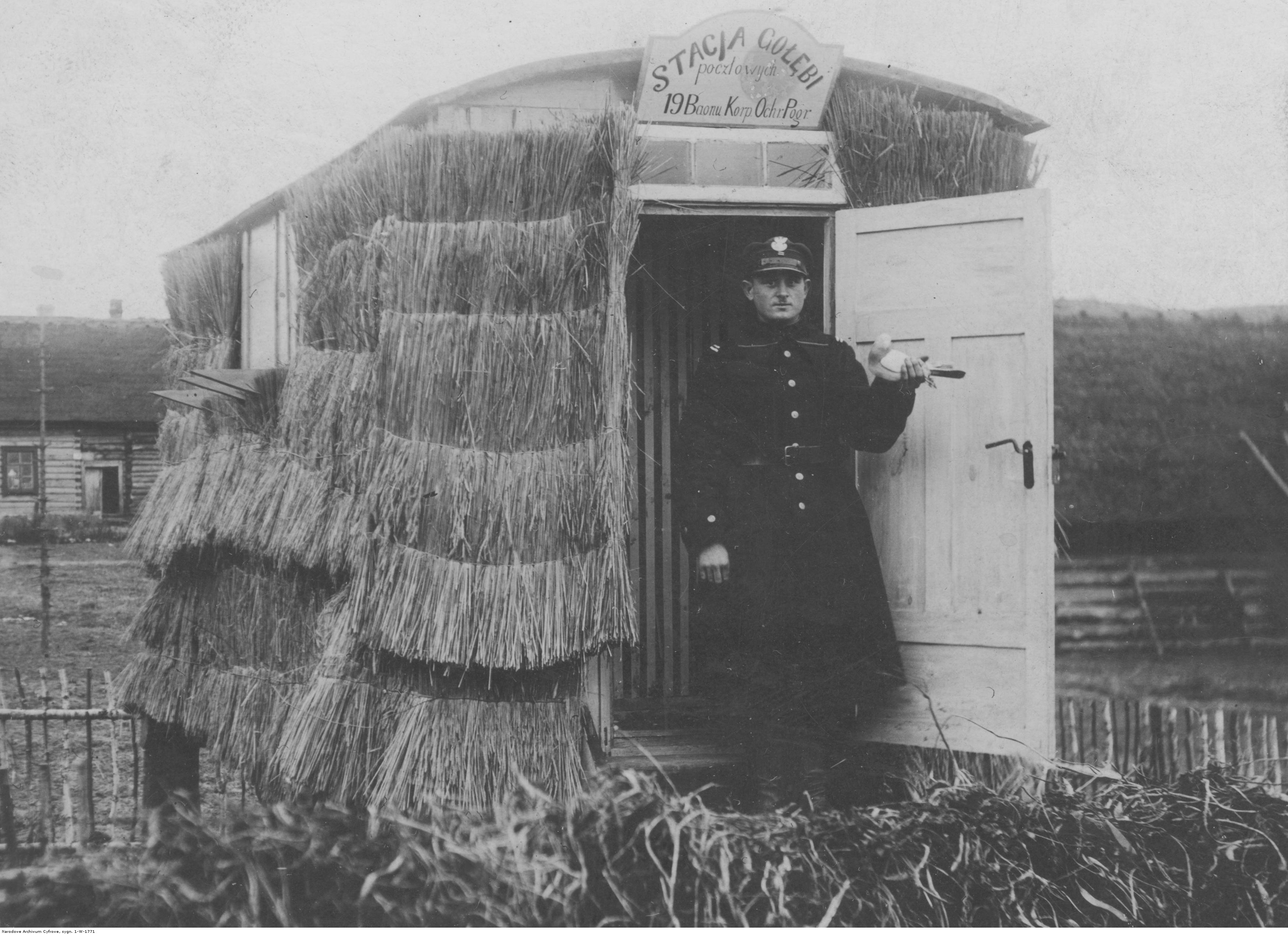 Stacja gołębi pocztowych 19 Batalionu Korpusu Ochrony Pogranicza. Koncern Ilustrowany Kurier Codzienny - Archiwum Ilustracji. Sygnatura: 1-W-1771